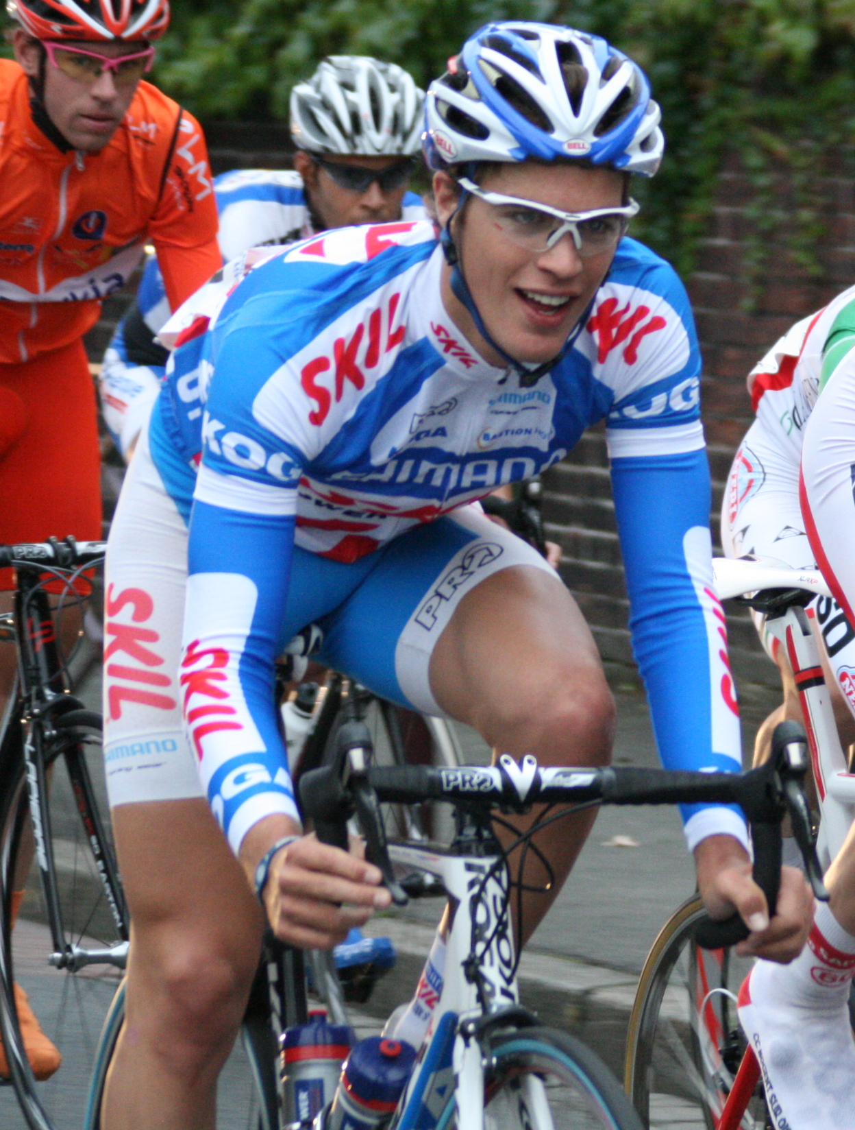 Steve Houanard lors du Guidon d'or hellemmois